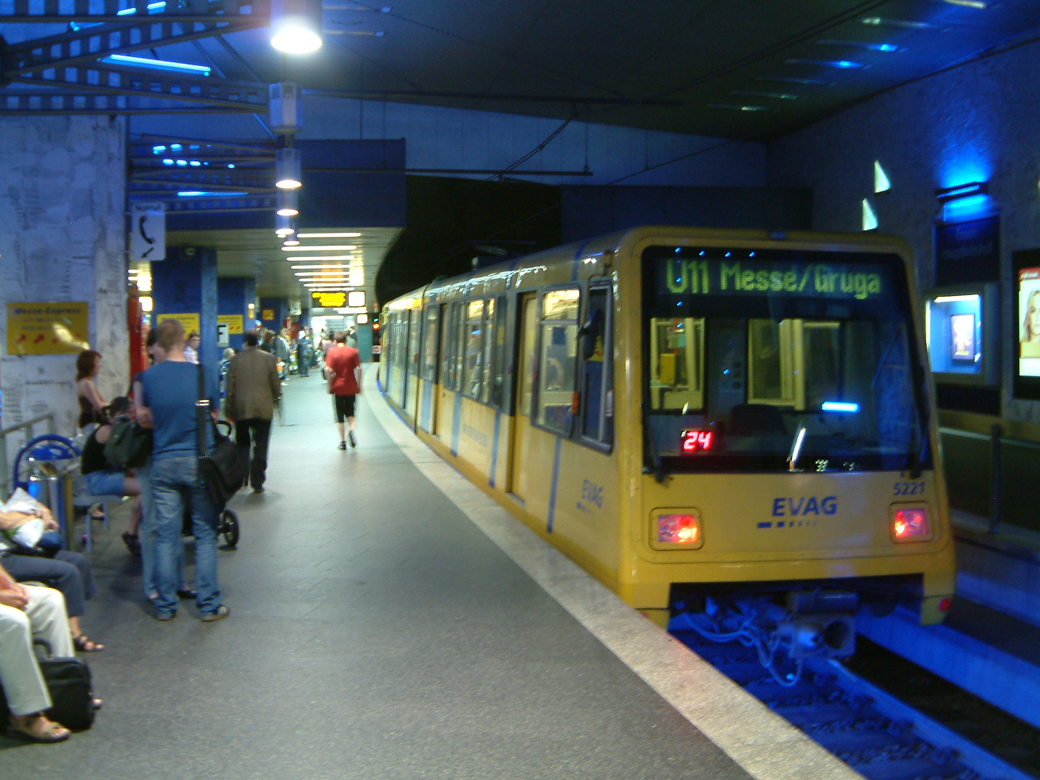 U-Bahn U11 der EVAG im Essener Hauptbahnhof